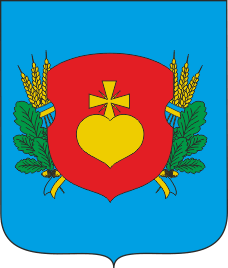 Герб Срібнянського району